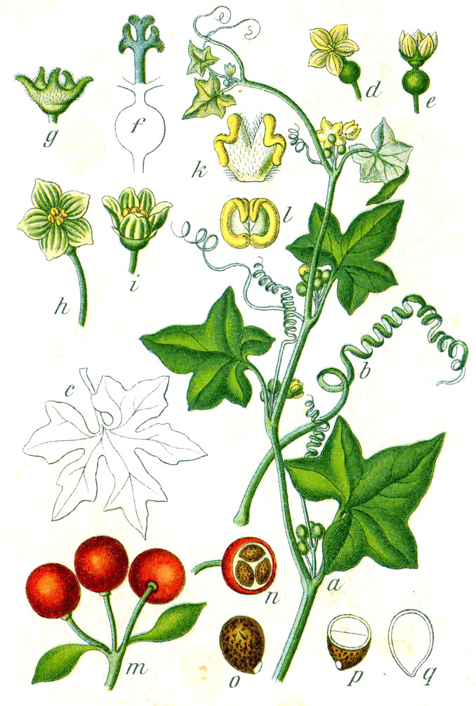 Bryonia dioica Jacq. Original Caption Rotfrüchtige Zaunrübe, Bryonia dioeca